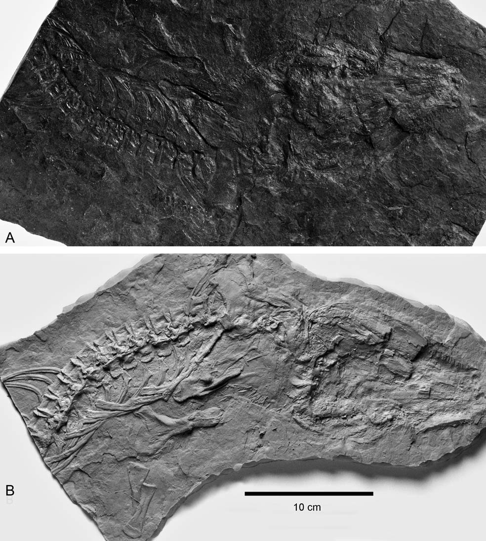 Solenodonsaurus janenschi Broili, 1924, photographs. A. Holotype MB. Am. 989.1; B. Plaster cast of the holotype.